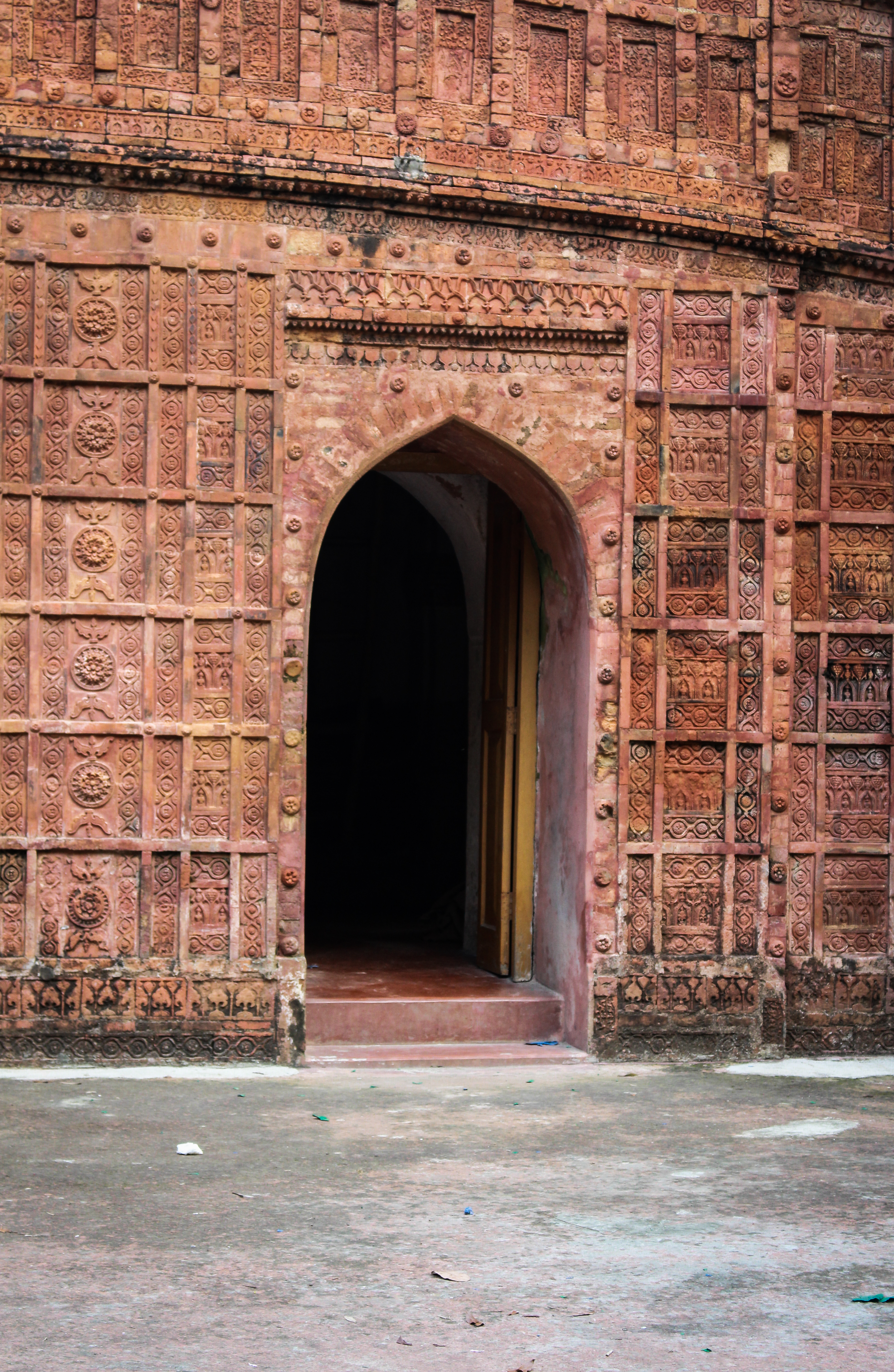 আতিয়া মসজিদ,দেলদুয়ার, টাঙ্গাইল।